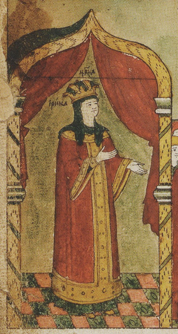 Годуновская псалтирь. Москва, 1594. РГБ. Ф.218. №78 Входит в группу из 11 лицевых псалтырей, выполненных в 1594 г. по заказу боярина Дм. Ив. Годунова для вкладов в разл. монастыри. Данная рукопись была вложена в Новодевичий монастырь. Она содержит 315 миниатюр. Рукопись украшена 2 вкладными миниатюрами. На одной - типичная для псалтырей миниатюра с царем Давидом. Вторая - уникальная по сюжету, не встречается в других памятниках этого круга. На ней изображено патриаршее богослужение в Успенском соборе М. Кремля. На амвоне - патриарх, по сторонам Федор Иоаннович и царица Ирина на царских местах. Среди молящихся, ближе к центру - Дмитрий Иванович Годунов.